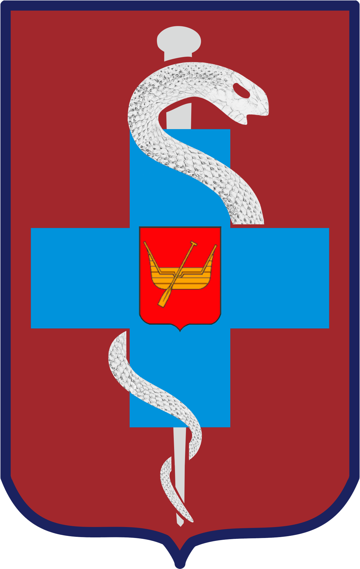 Na podstawie decyzji Nr 47/MON MINISTRA OBRONY NARODOWEJ z dnia 21 lutego 2012 r. wprowadza się oznakę rozpoznawczą Wojskowego Centrum Kształcenia Medycznego im. gen. bryg. dr. med. Stefana Hubickiego.